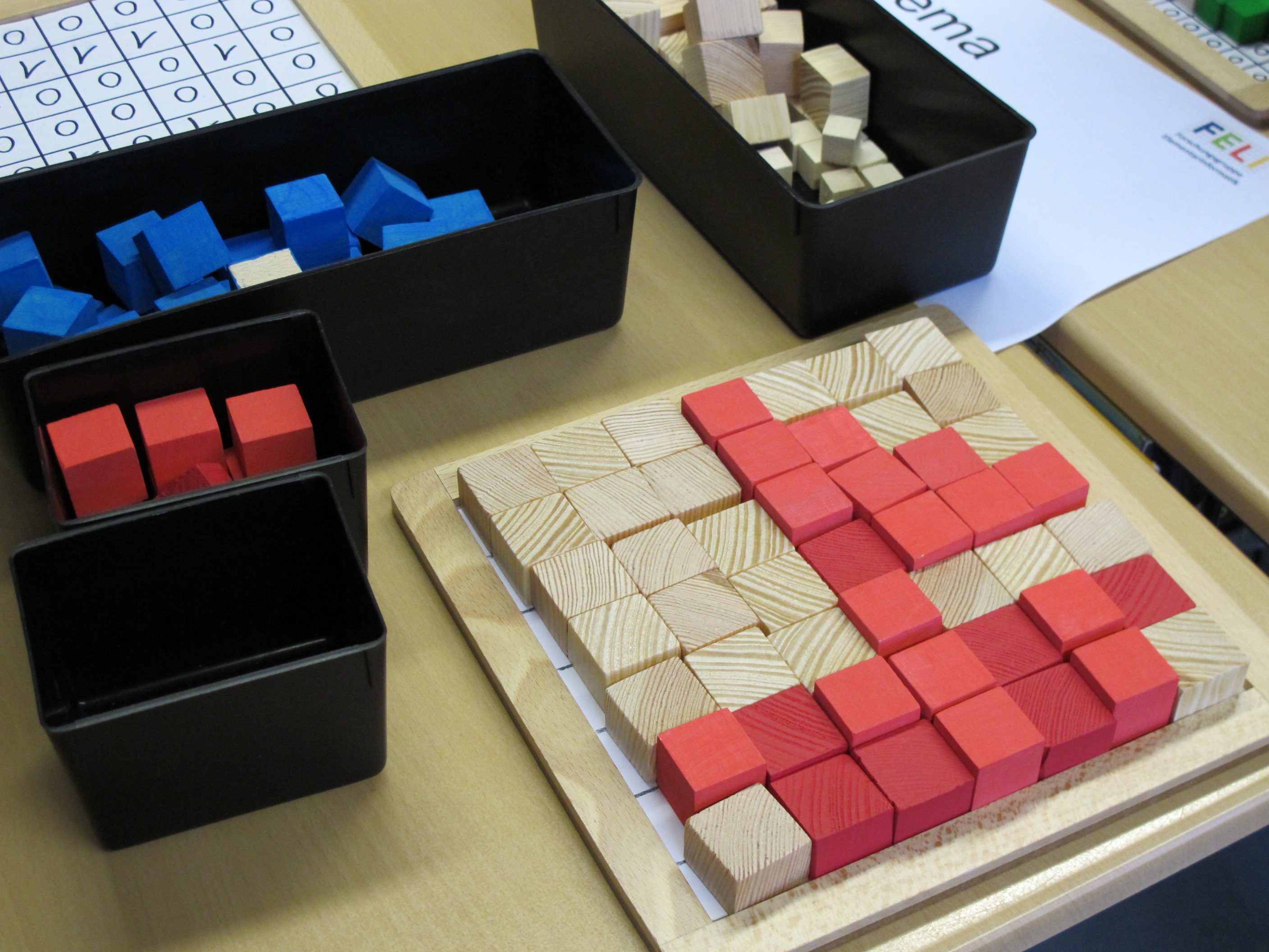 Legespiel mit Holzwürfeln zur Veranschaulichung des Konzepts Pixel